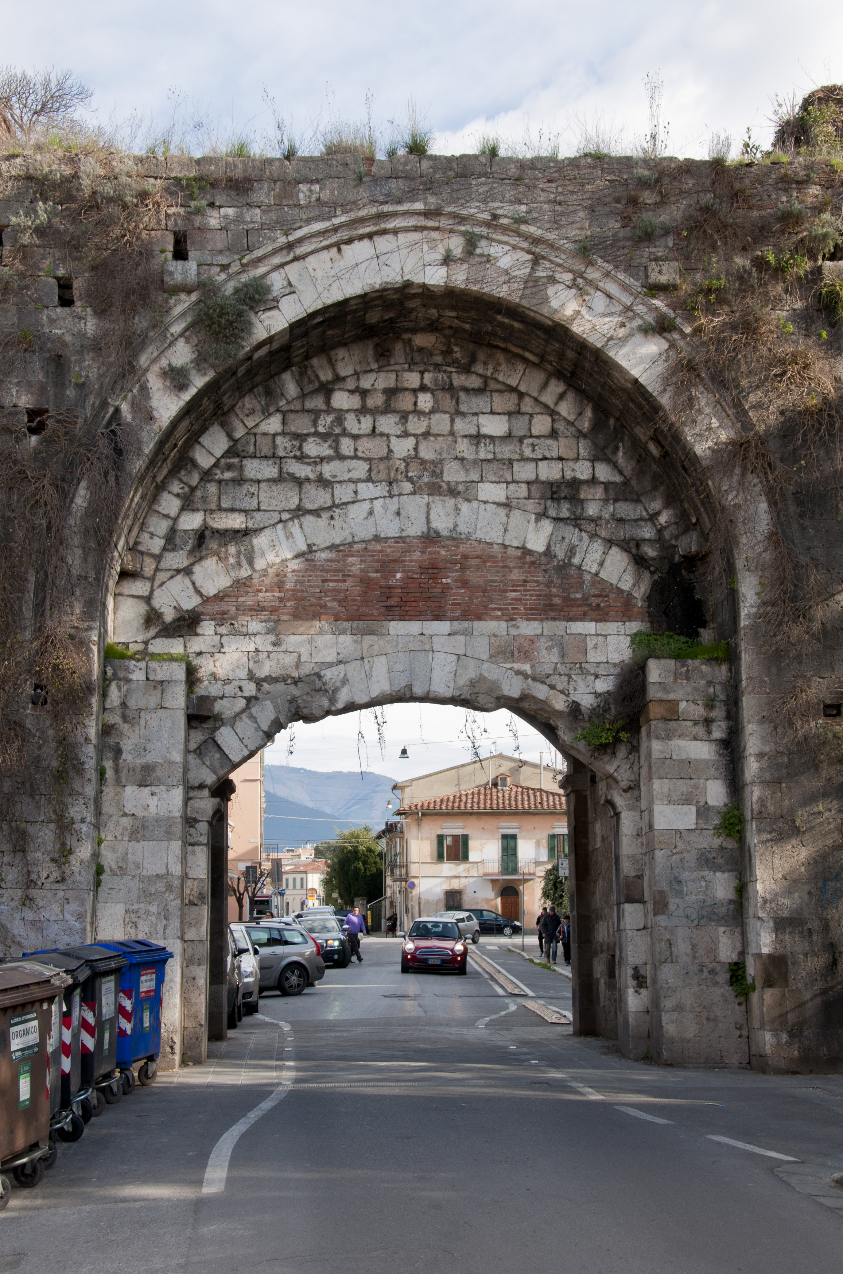 Porta Calcesana nelle mura di Pisa